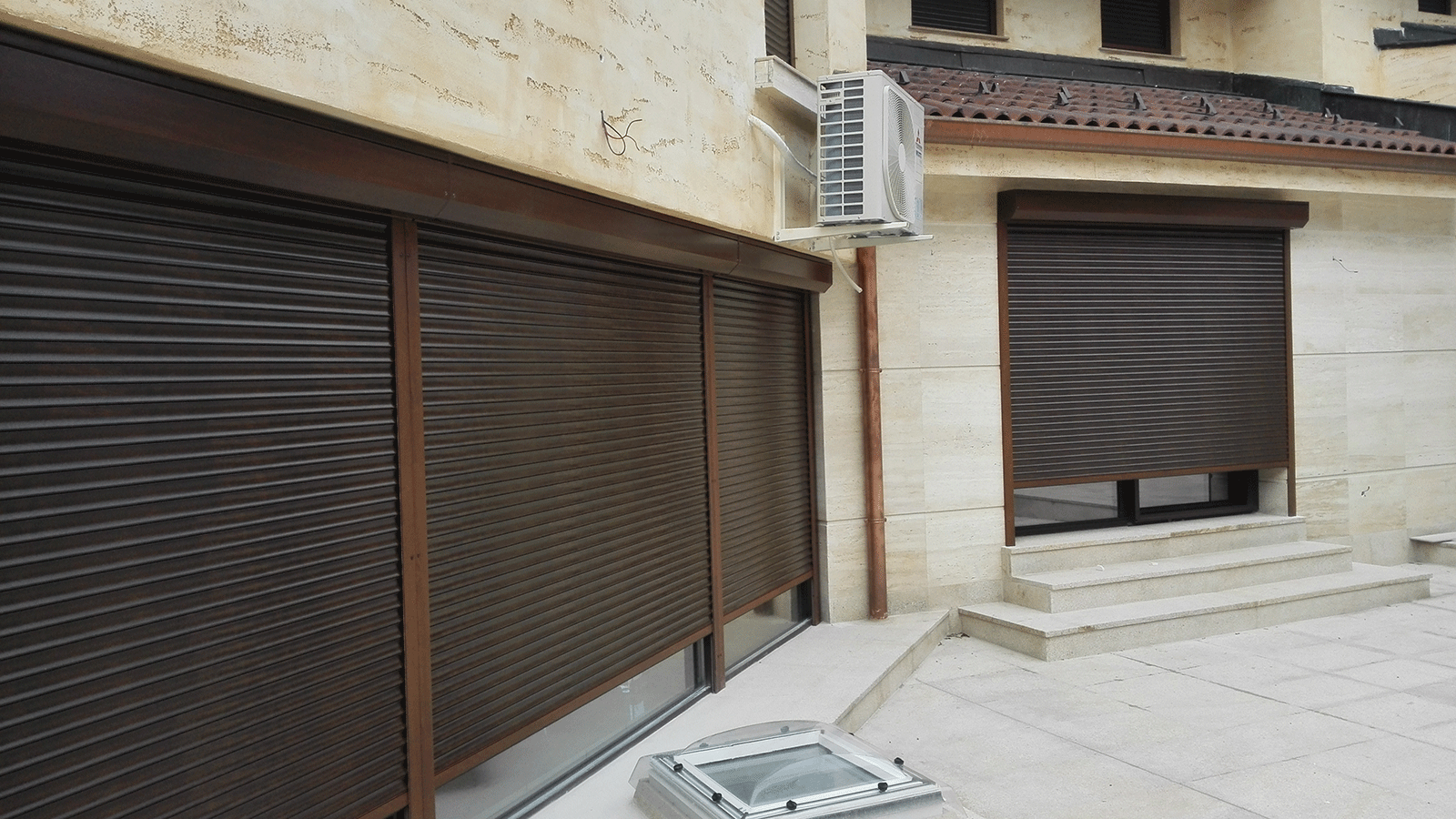 Външни-ролетни-щори-модерна-къща прахово боядисани